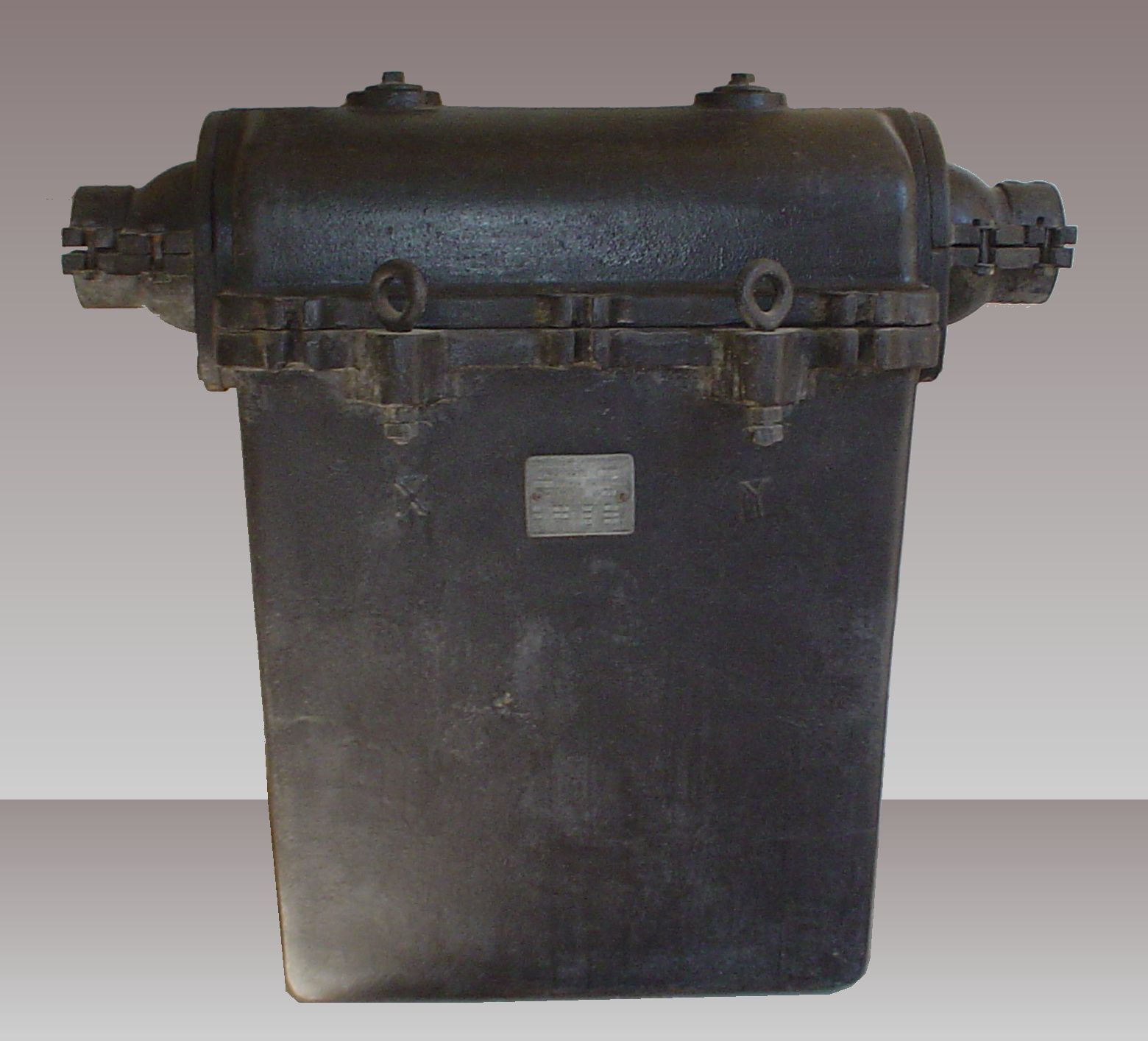 Poto_de_Pupin trapasa.